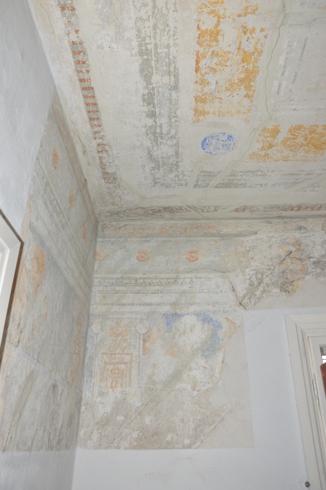 Rūmų interjeras